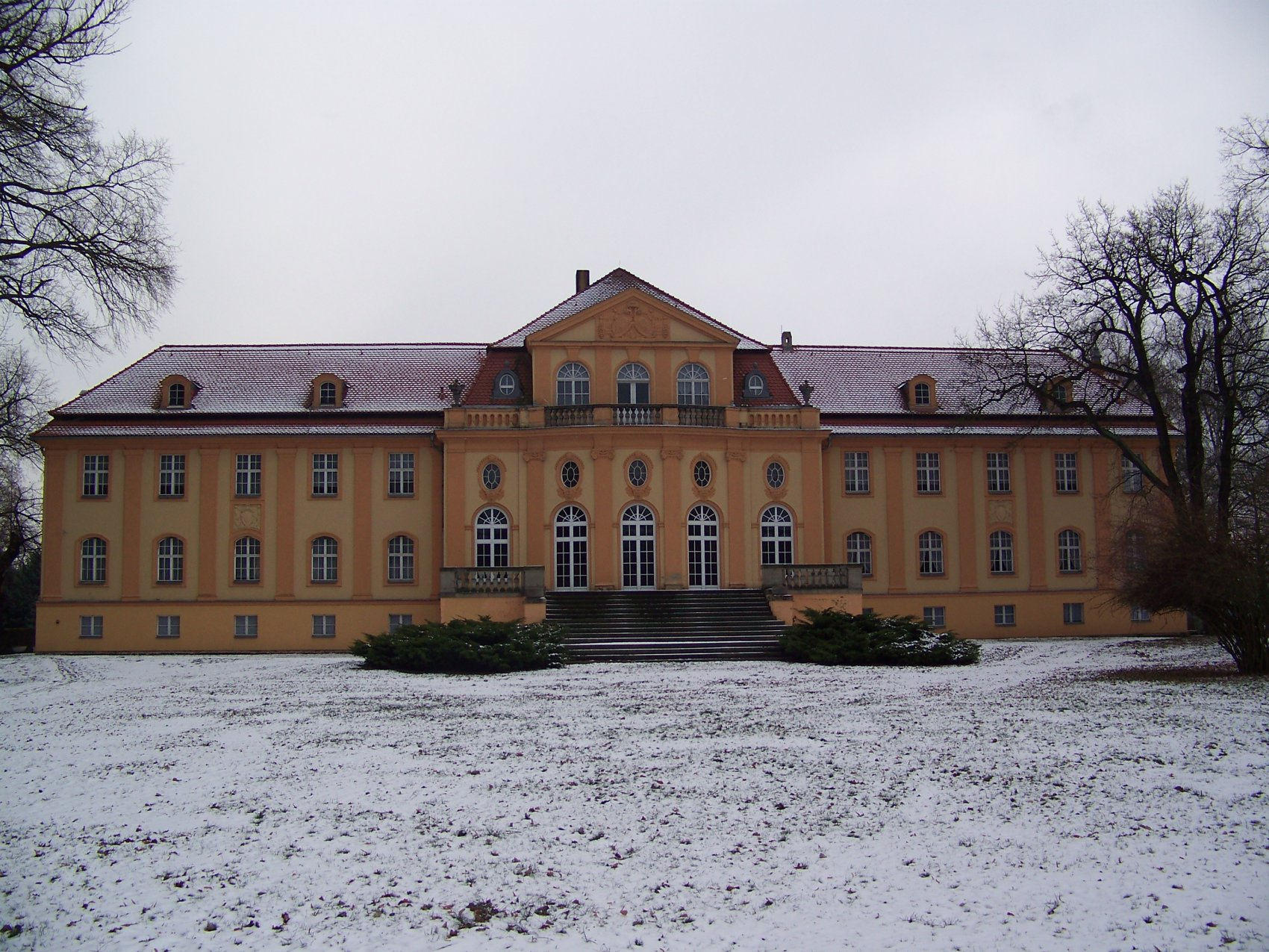 Schloss Lipsa This is the photograph of an architectural monument. It is part of the list of cultural monuments of Lipsa, no. 09120226